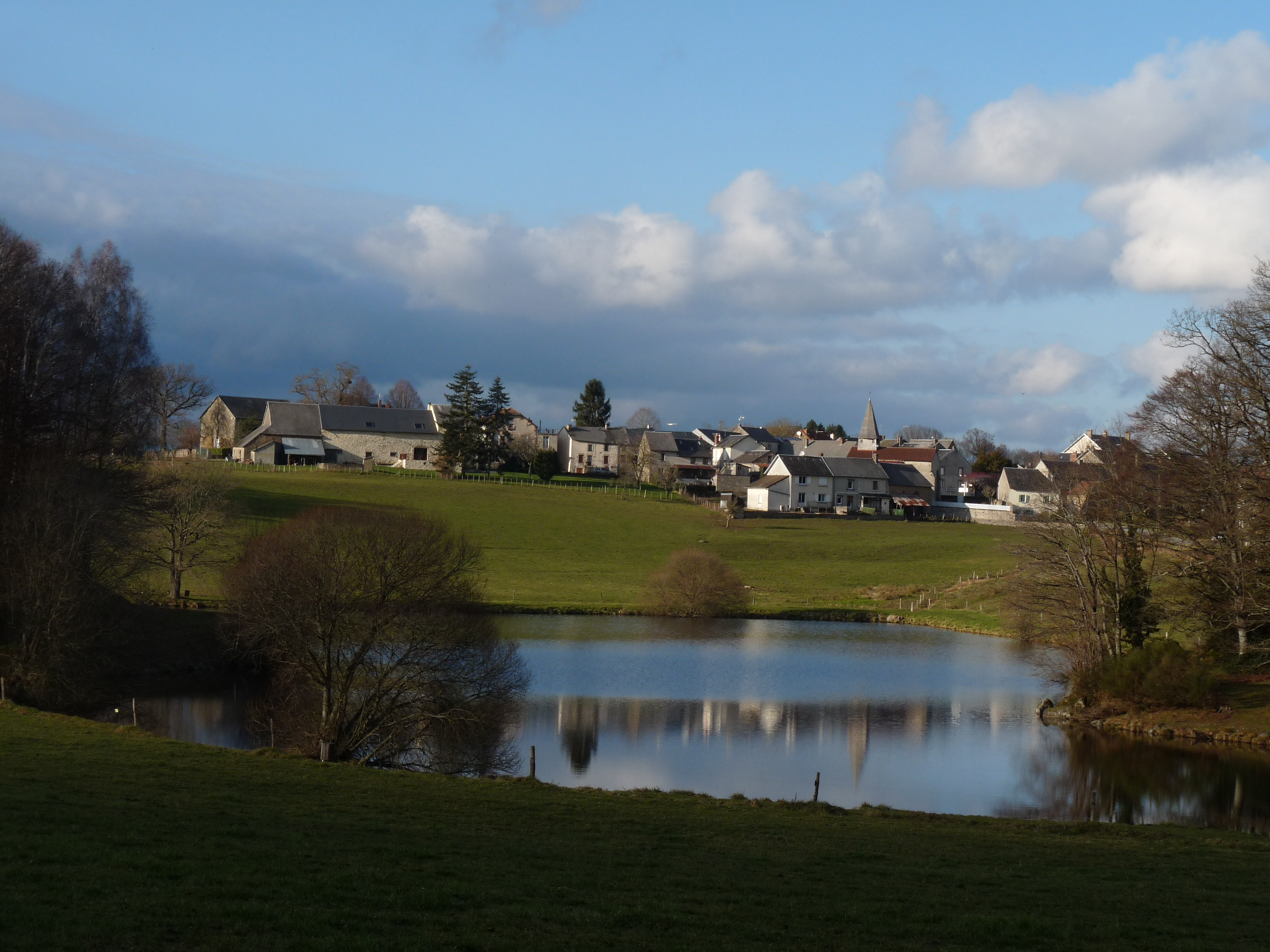 Le bourg de Chamborand en Creuse, se reflétant dans l'étang de La Chaise.